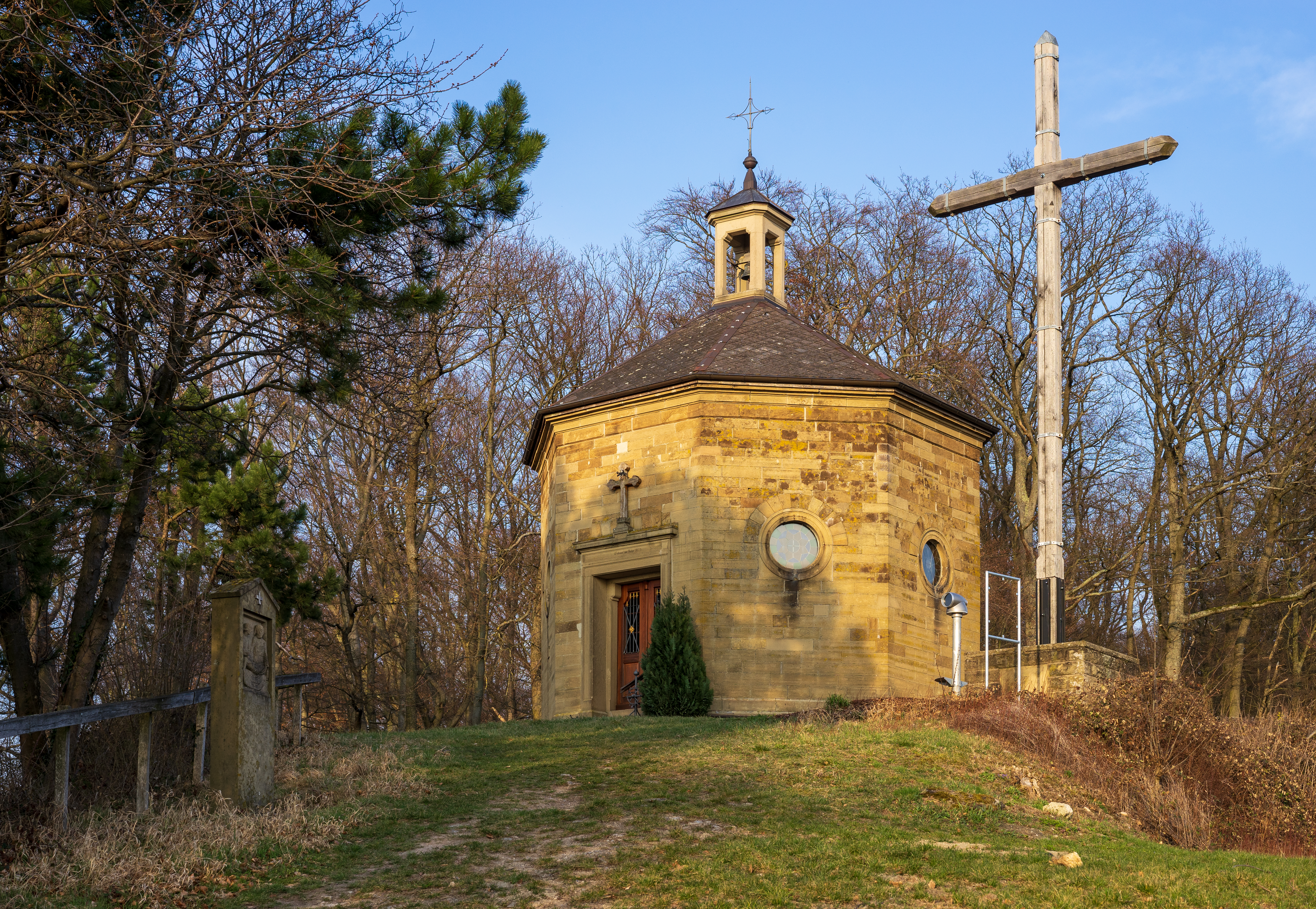 Östringen (Landkreis Karlsruhe), Teilort Tiefenbach: Die Kreuzbergkapelle (erbaut 1872) mit Abendsonne, gesehen von West-Südwesten. Links die letzte Station des Kreuzweges, rechts das sog. Ostlandkreuz.